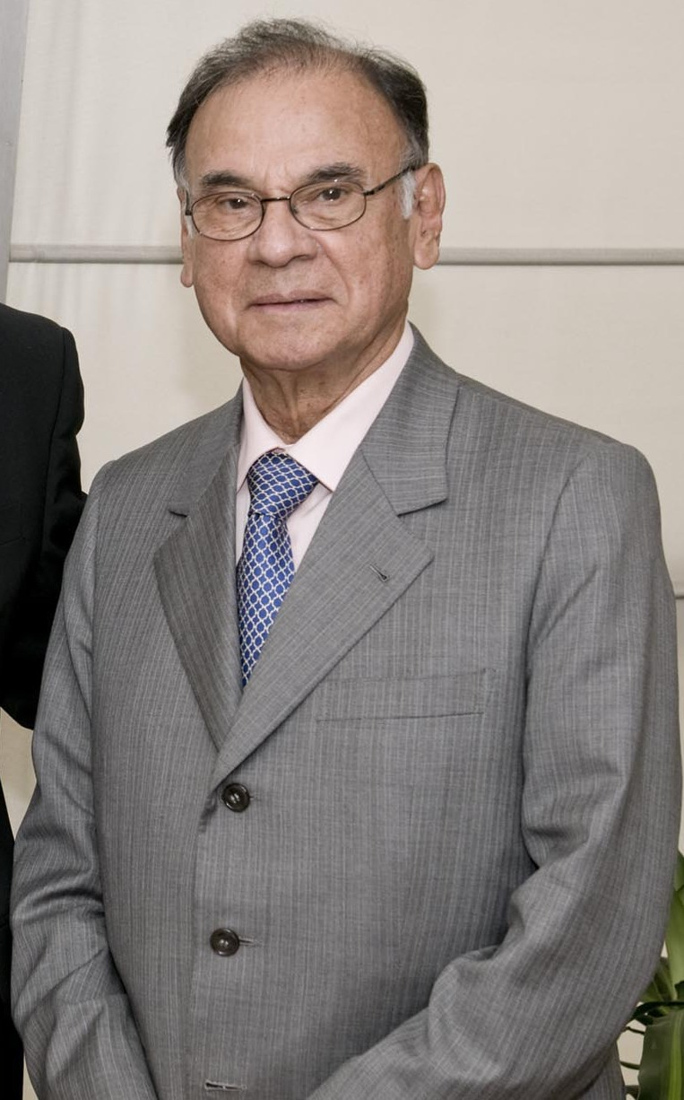 Buenos Aires, Octubre 17 de 2011. El Canciller Héctor Timerman almorzó hoy con Alí Rodriguez Araque, Ministro de Energía Eléctrica de Venezuela y designado Secretario General de UNASUR para el período 2012-2013. foto Roberto Daniel Garagiola